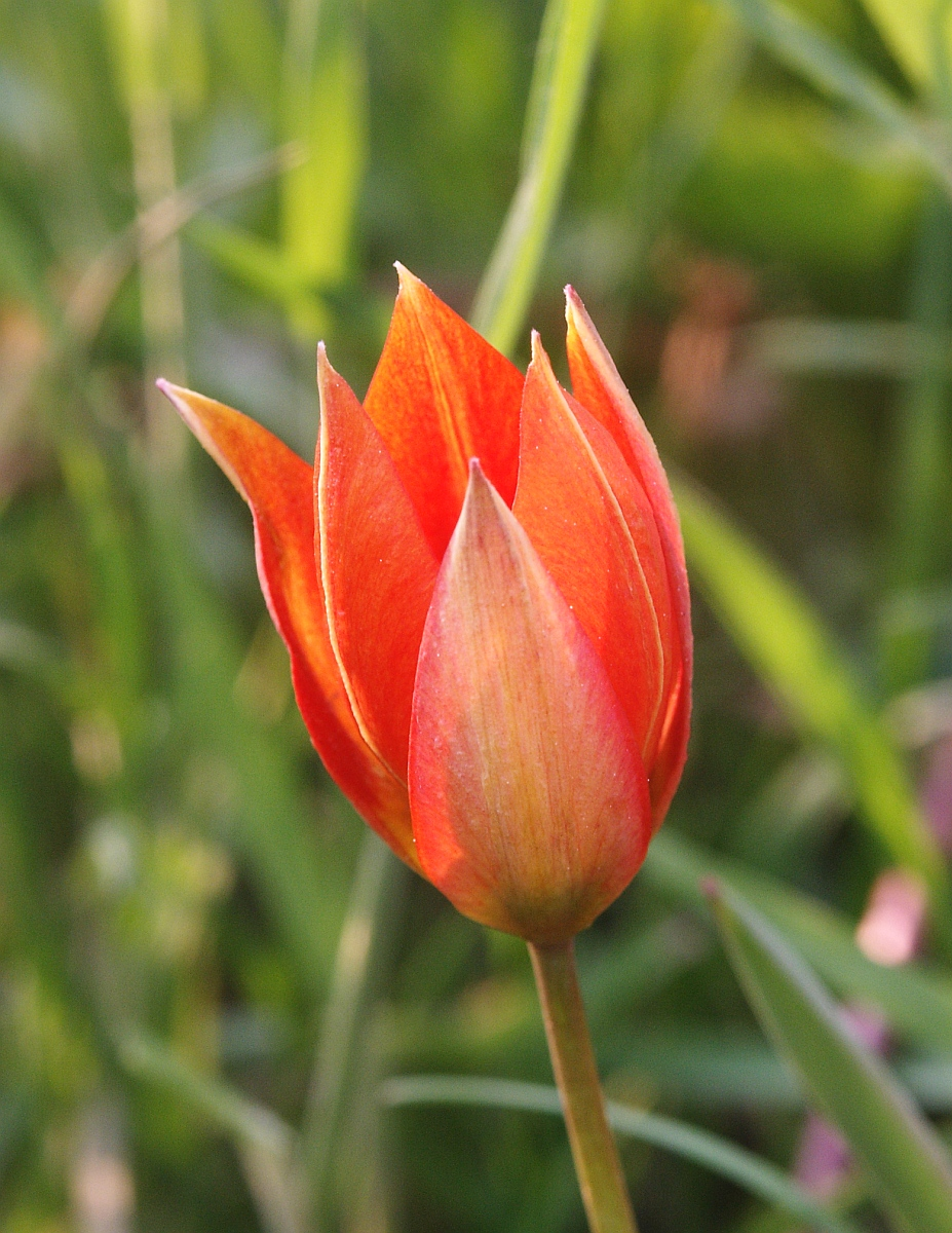 Tulipa orphanidea, garden plant